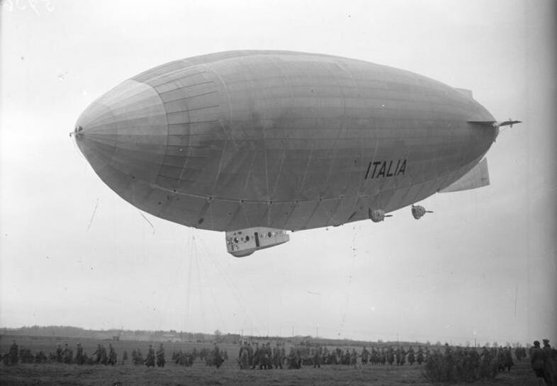 Die glückliche Landung des Nordpol-Luftschiffes "Italia" in Stolp in Pommern! Nach 30 stündigem Fluge landete das italienische Nordpolluftschiff "Italia" unter Führung des Generals [Umberto] Nobile wohlbehalten in Stolp in Pommern. Eine Stabiliesierungsfläche am Luftschiff wurde im Gewittersturm stark beschädigt. Die "Italia" kurz vor ihrer Landung in Stolp in Pommern. 250 Reichswehrsoldaten leisteten bei der Landung Hilfe. Im Bilde oben rechts die stark beschädige Stabilisierungsfläche des Luftschiffes.